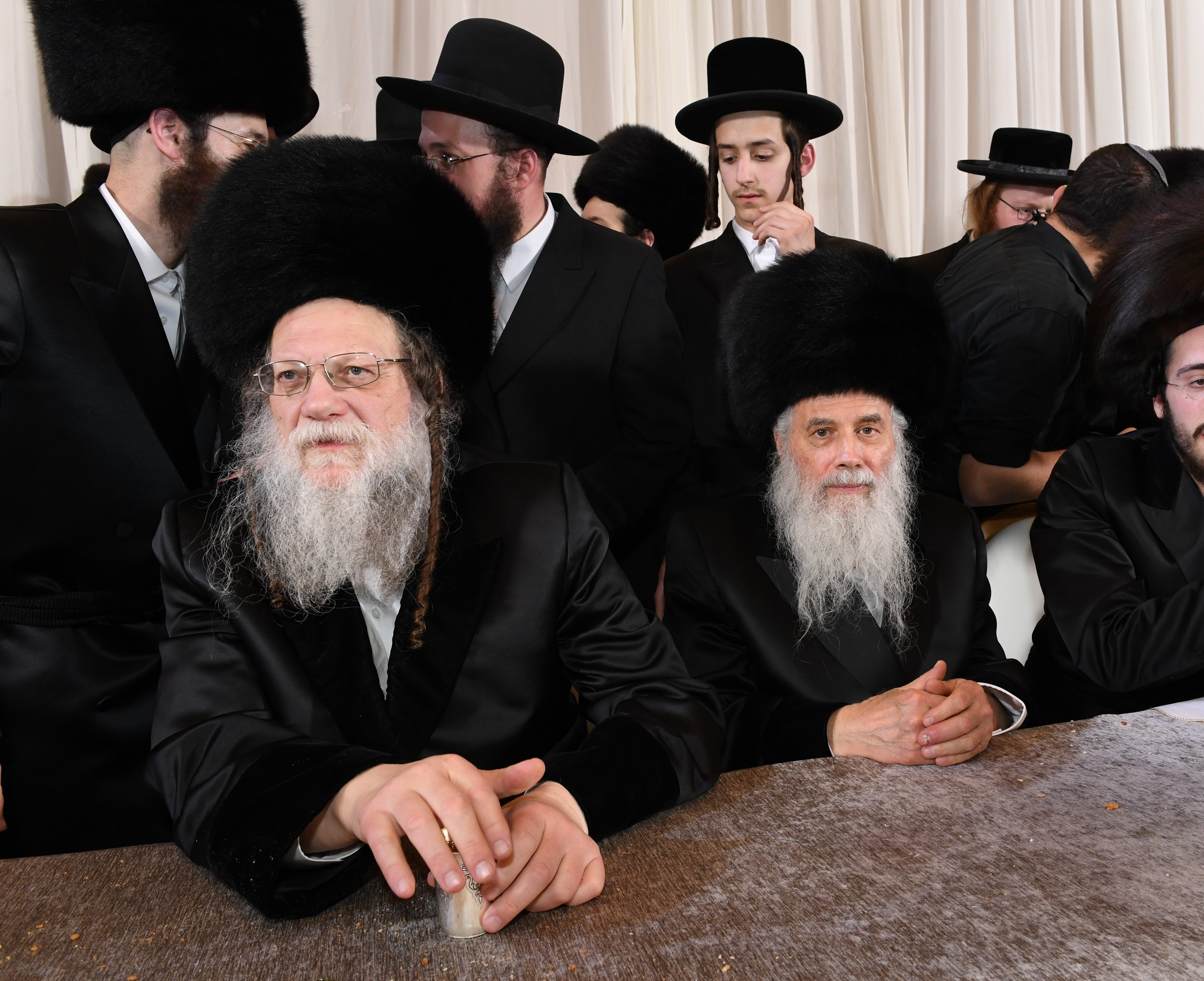 הרביים ממודזיץ